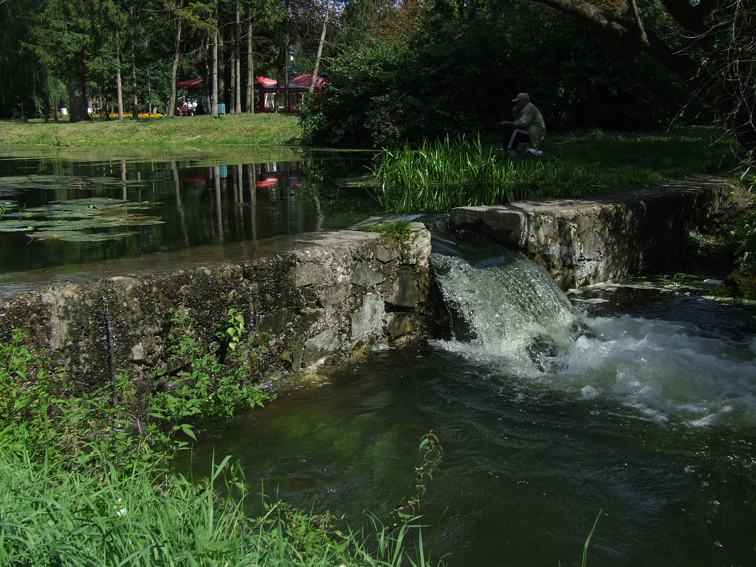 Каскад штучних озер та річок у гідропарку «Топільче».